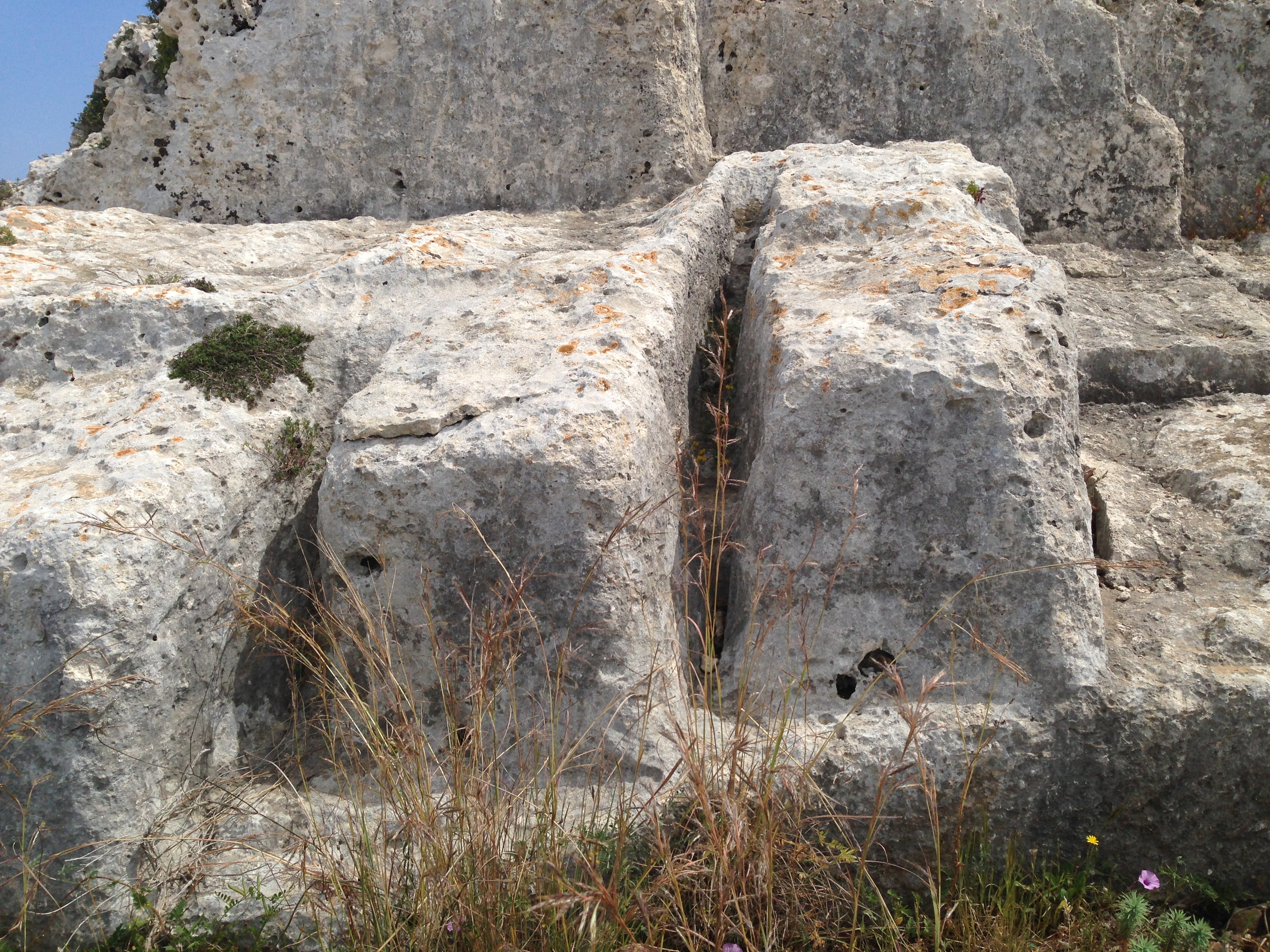 Blocchi pietra sbozzata per le mura dionigiane nei pressi della Tonnara